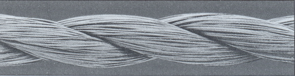 Kétágú cérna képe